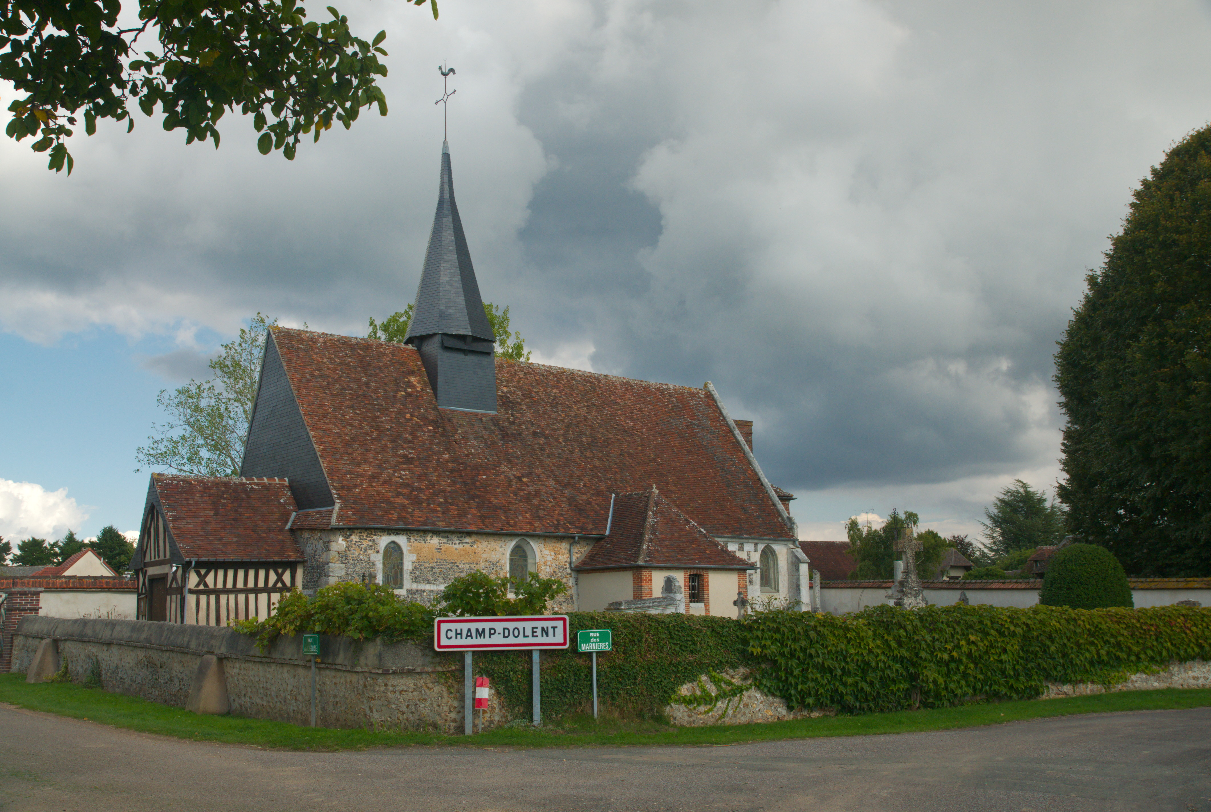 Église Notre-Dame de Champ-Dolent .